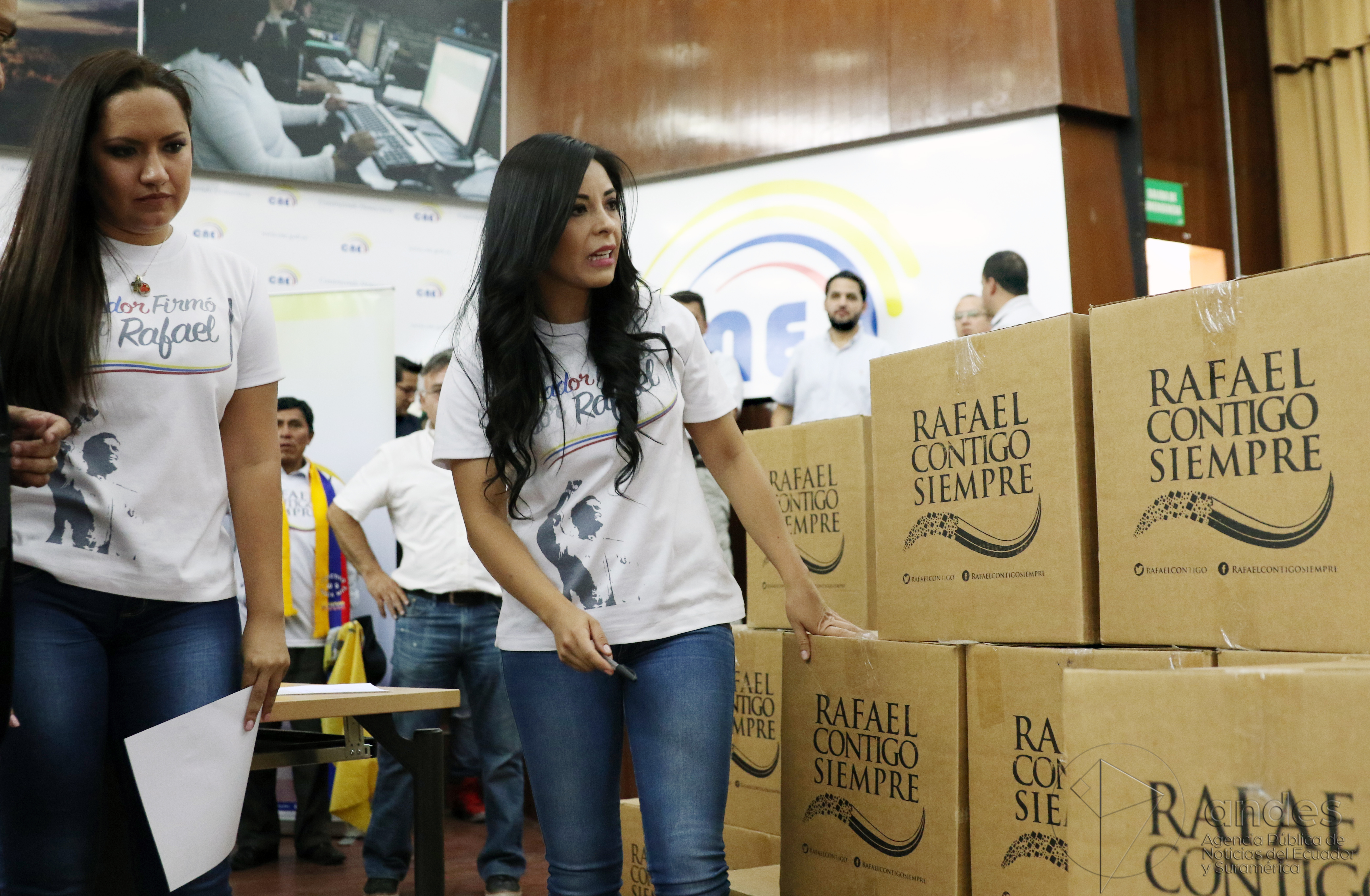 Quito, 15 ago (Andes).- El colectivo ciudadano Rafael Contigo Siempre entregó este lunes al Consejo Nacional Electoral (CNE) de Ecuador 1'248.000 firmas, con las que se busca un referendo para enmendar la Constitución y que se permita la candidatura del actual mandatario, Rafael Correa, en los comicios programados para el 19 de febrero de 2017. ANDES/Micaela Ayala V.